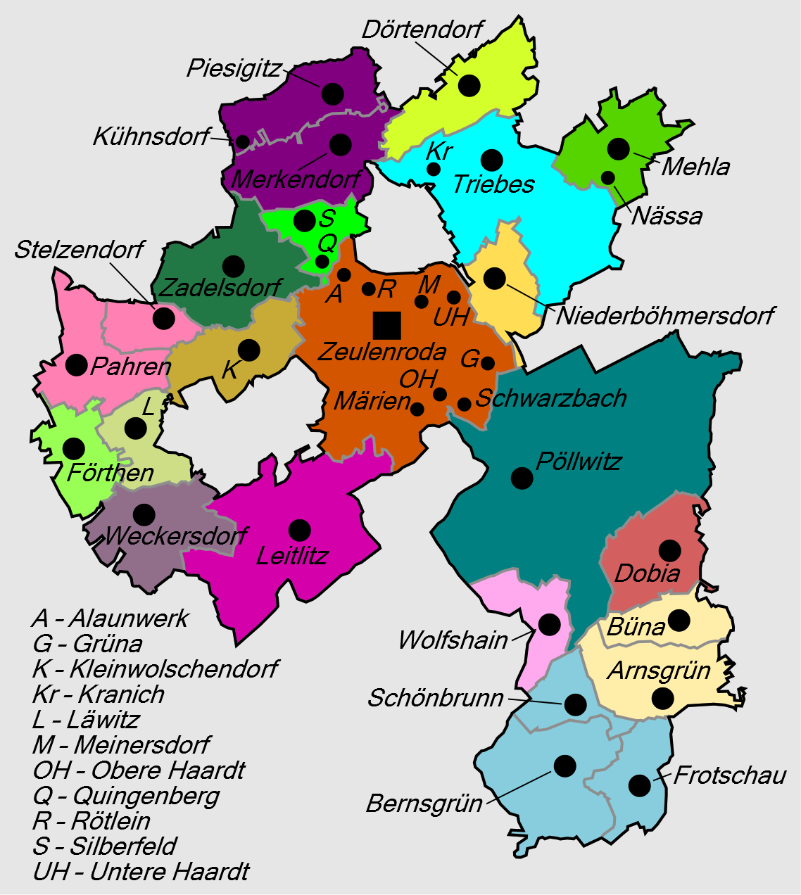 Gliederung der Stadt Zeulenroda-Triebes ab 1. Januar 1974